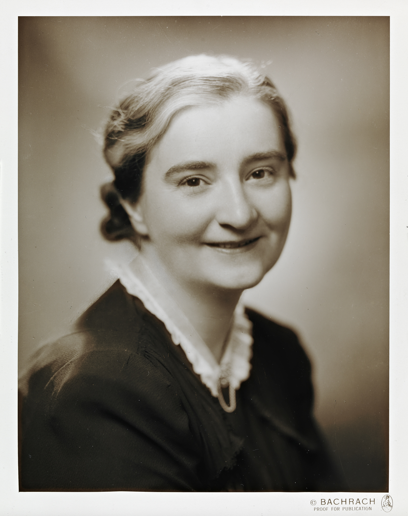 Tittel / Title: Portrett av Åse Gruda Skard (1905-1985) Beskrivelse / Description: Åse Gruda Skard var barnepsykolog og kvinnesakskvinne. Dato / Date: 1941 Fotograf / Photographer: Bachrach Eier / Owner Institution: Nasjonalbiblioteket / National Library of Norway Lenke / Link: Bildesignatur / Image Number: bldsa_SKARD1024